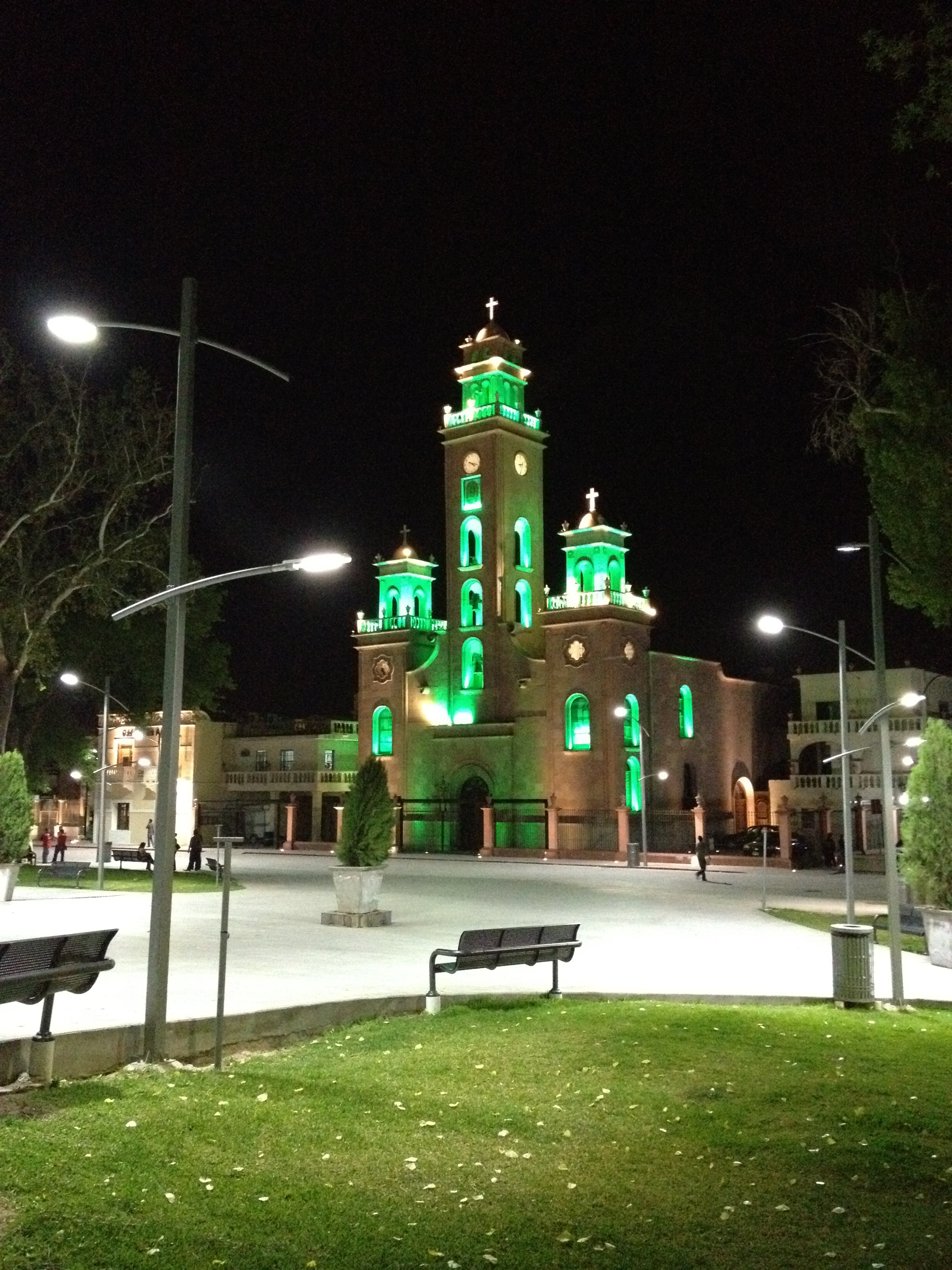 Santuario de Nuestra Señora de Guadalupe, joya arquitectónica de la ciudad de Piedras Negras, localizado en la Gran Plaza, en el centro de la ciudad.